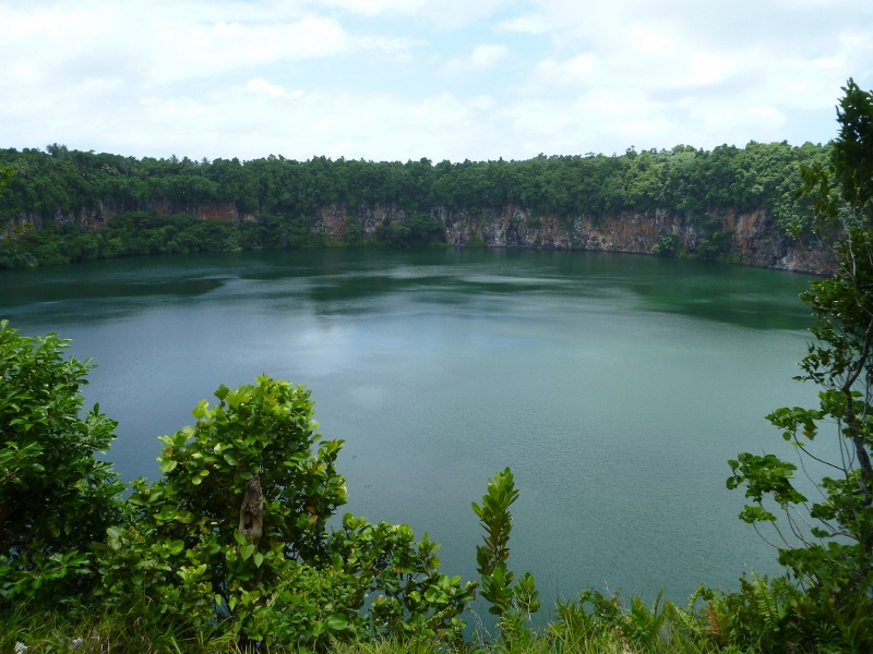 Le lac Lalolalo (sur l'île de Wallis, Wallis-et-Futuna).